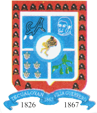 Es el escudo de mi municipio